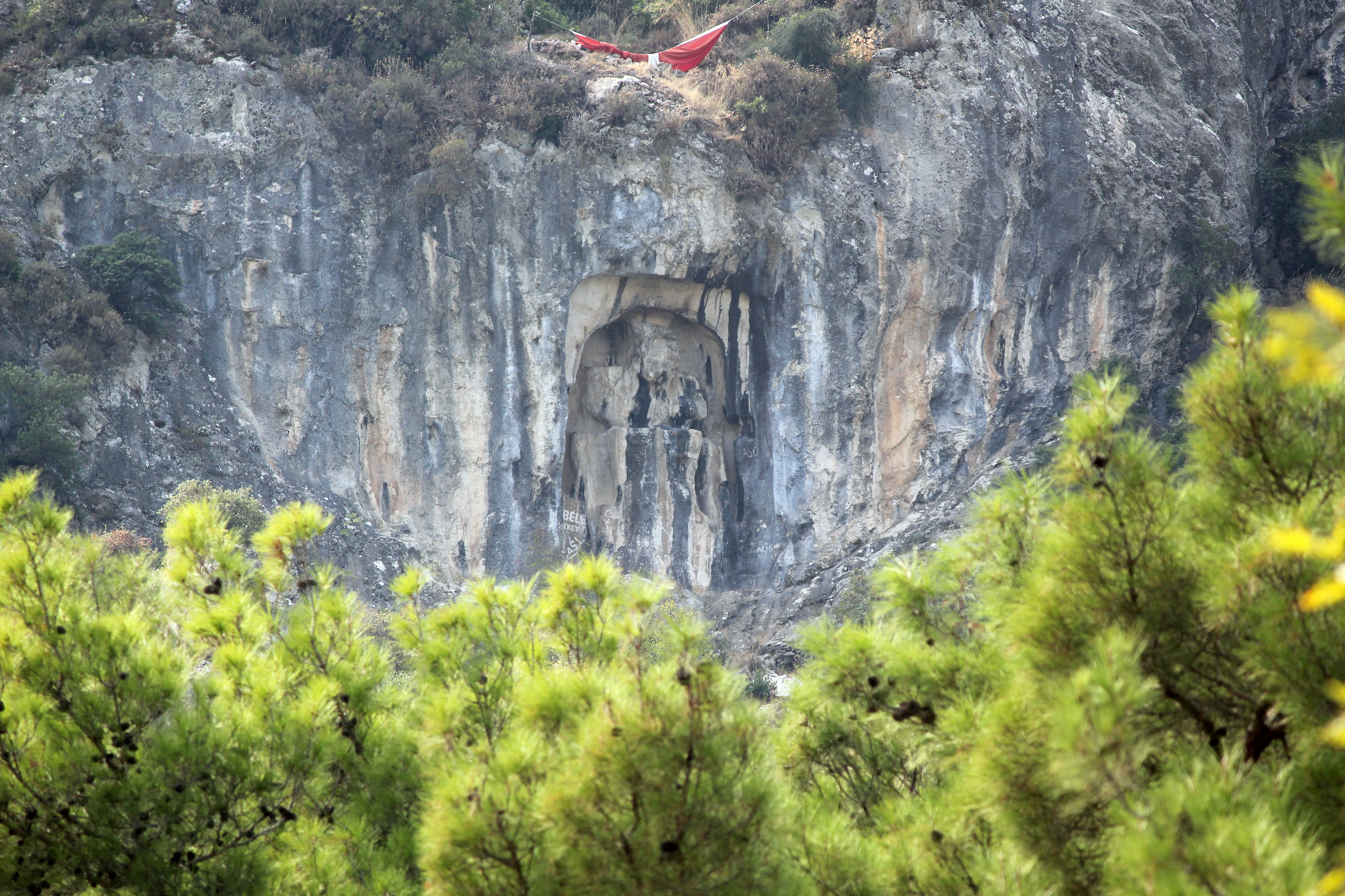 Hethitisches Relief bei Akpınar/Manisa, Westtürkei, bekannt als "Kybele-Relief"